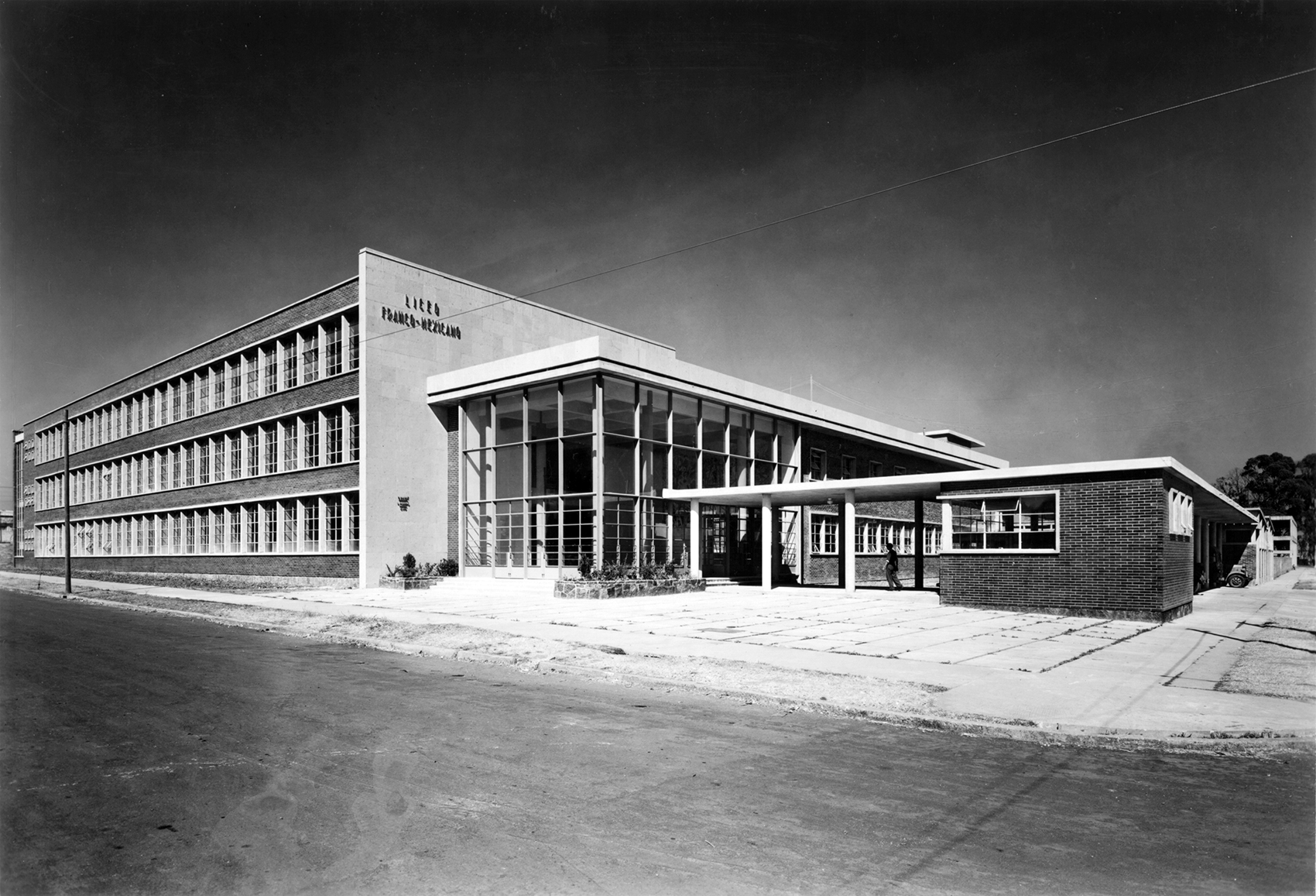 Lycée Franco-Mexicain